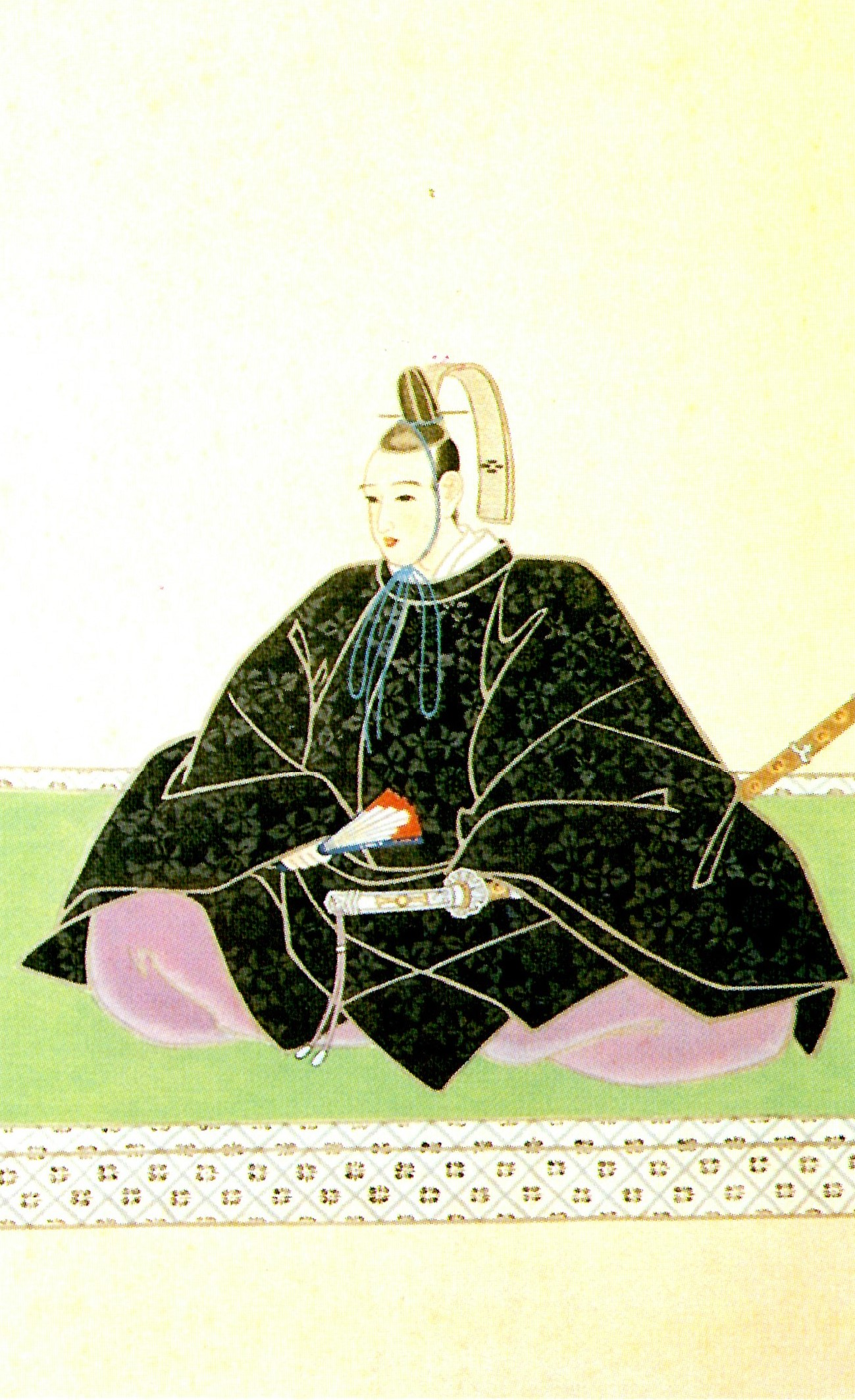 戸田氏彬の肖像。